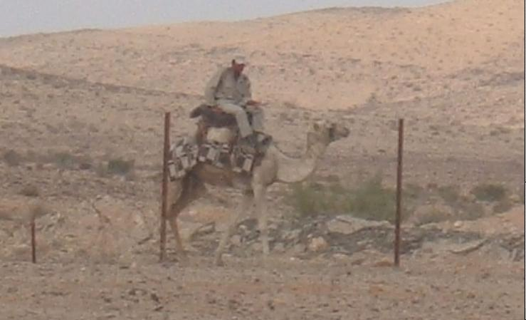 רוכב גמל מצרי מפטרל על גבול ישראל-מצרים. צולם באוגוסט 2005.